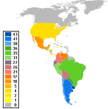 Mapa de las Américas, que muestra a los países que han participado de la Copa América, desde su primera edición en 1916 hasta la fecha.